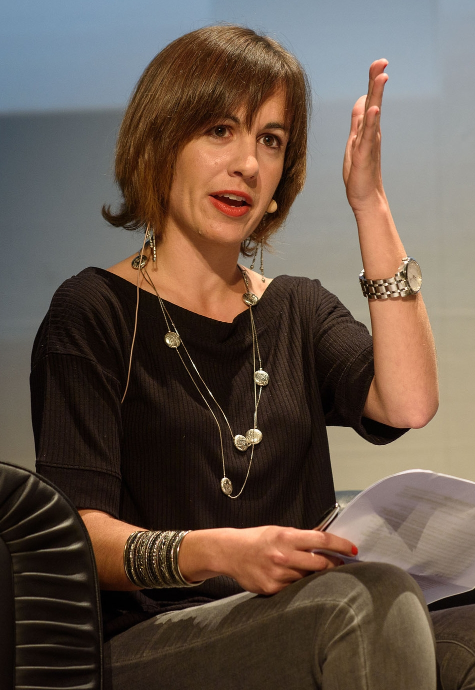 Katixa Agirre euskal idazlea